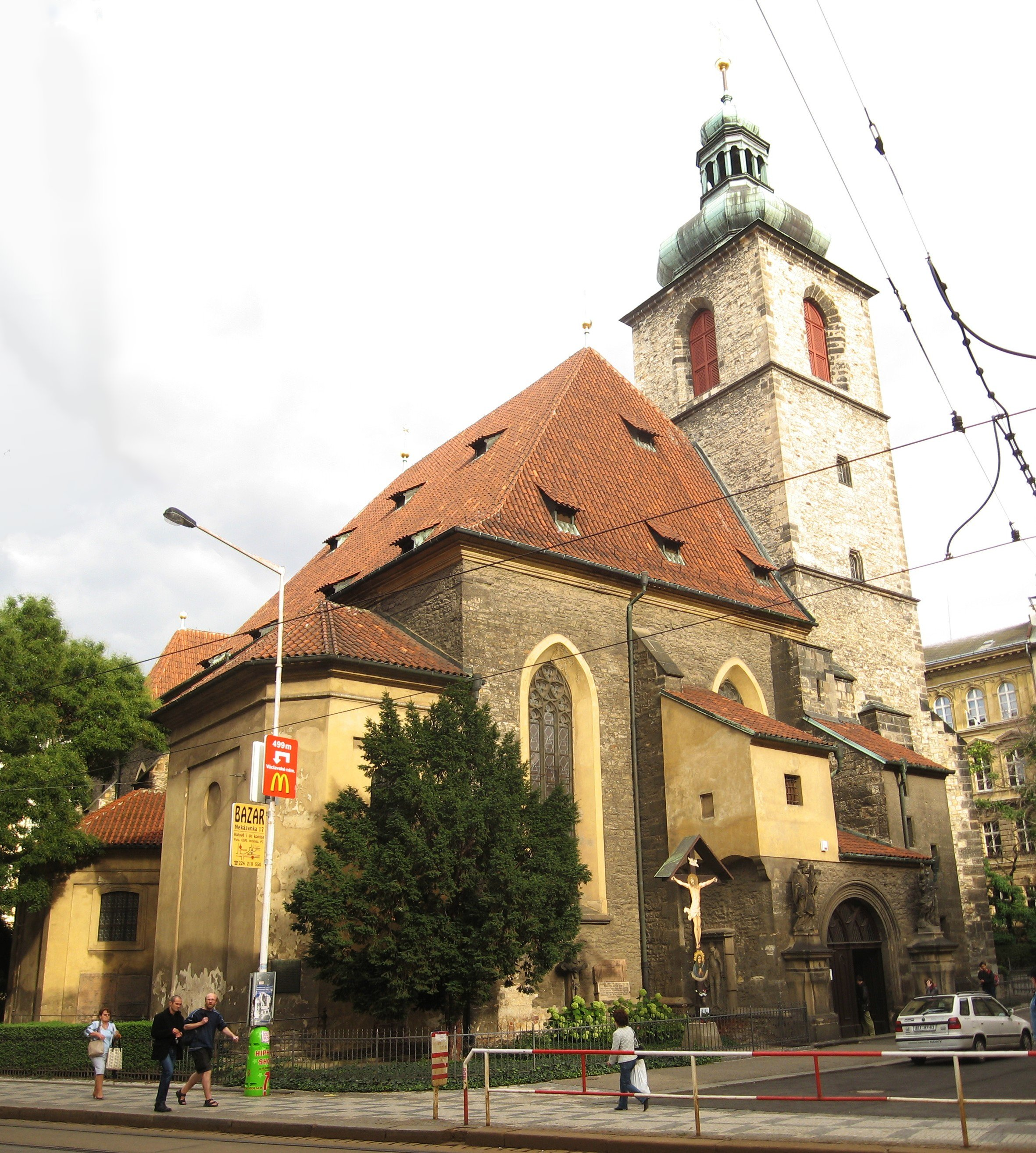 Kostel sv. Jindřicha a Kunhuty na Novém Městě, ul. Jindřišská, Praha.